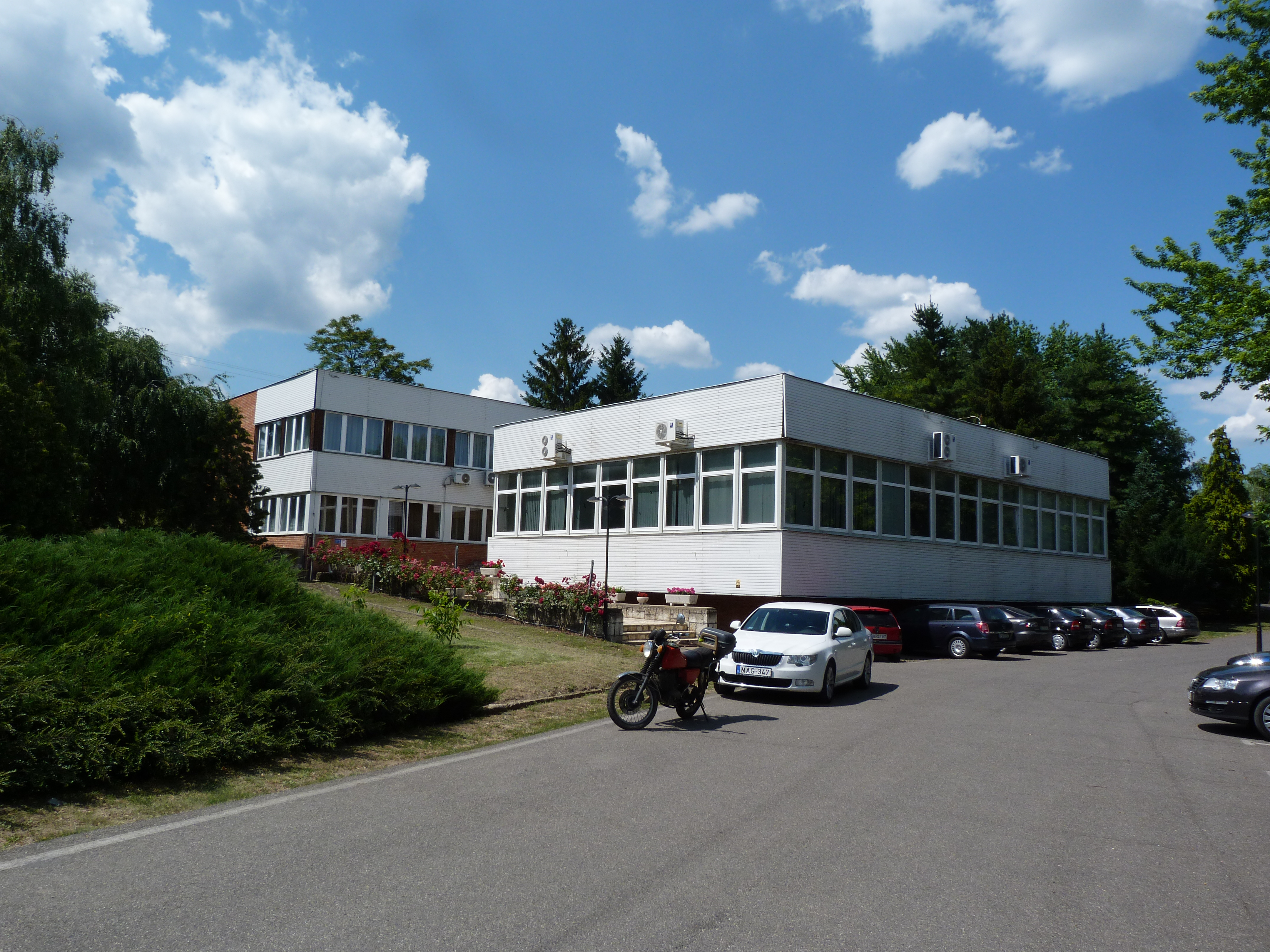 A felvétel 2014. június 18-án szerdán készült Tolcsván. Tokaj Kereskedőház Zrt.